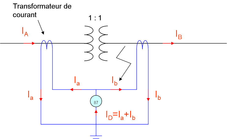 Illustration fonctionnement d'une protection différentielle, défaut interne